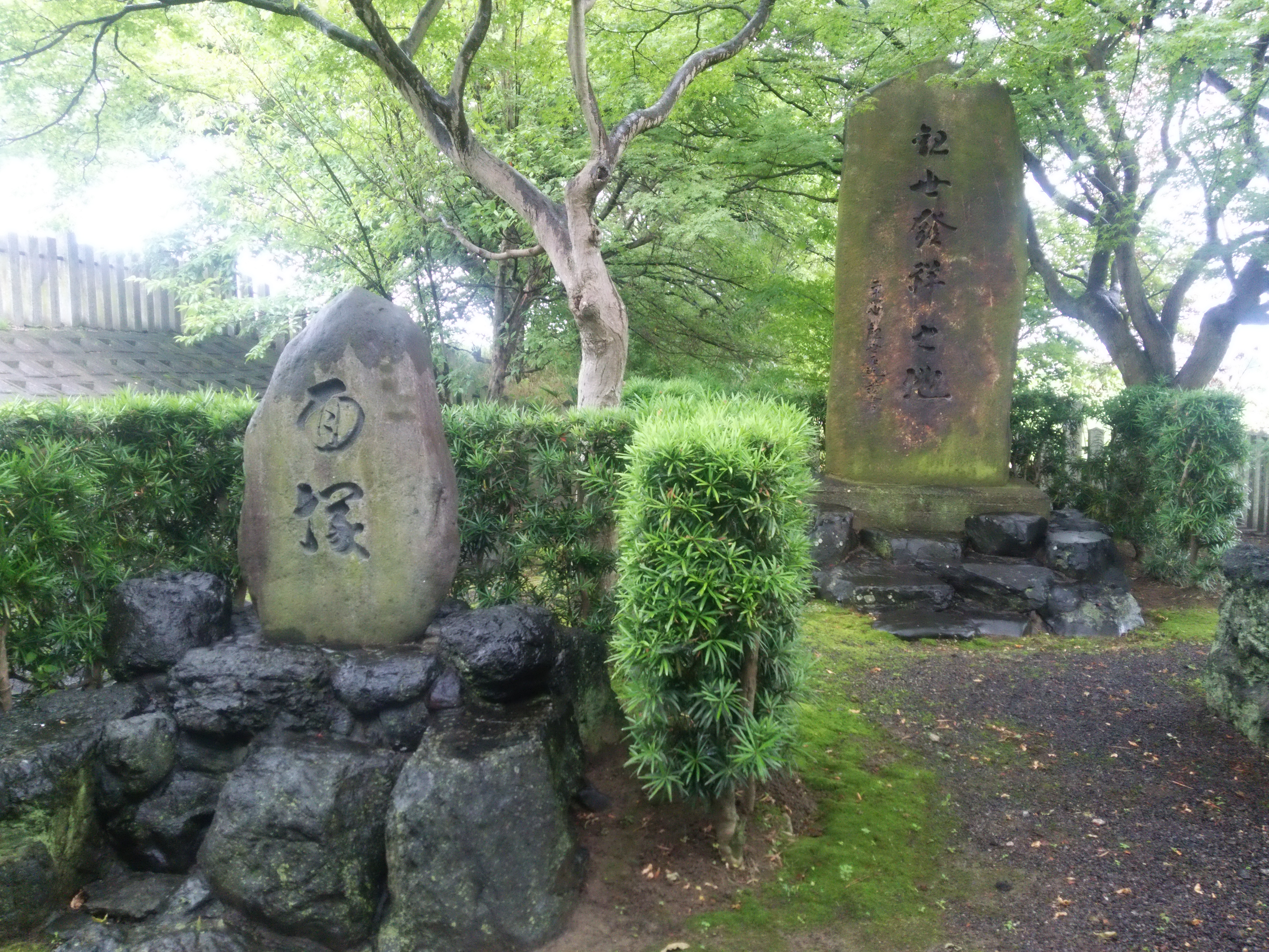 翁の面とネギ一束が空から降ってきたという伝説の面塚と観世流発祥の地の碑